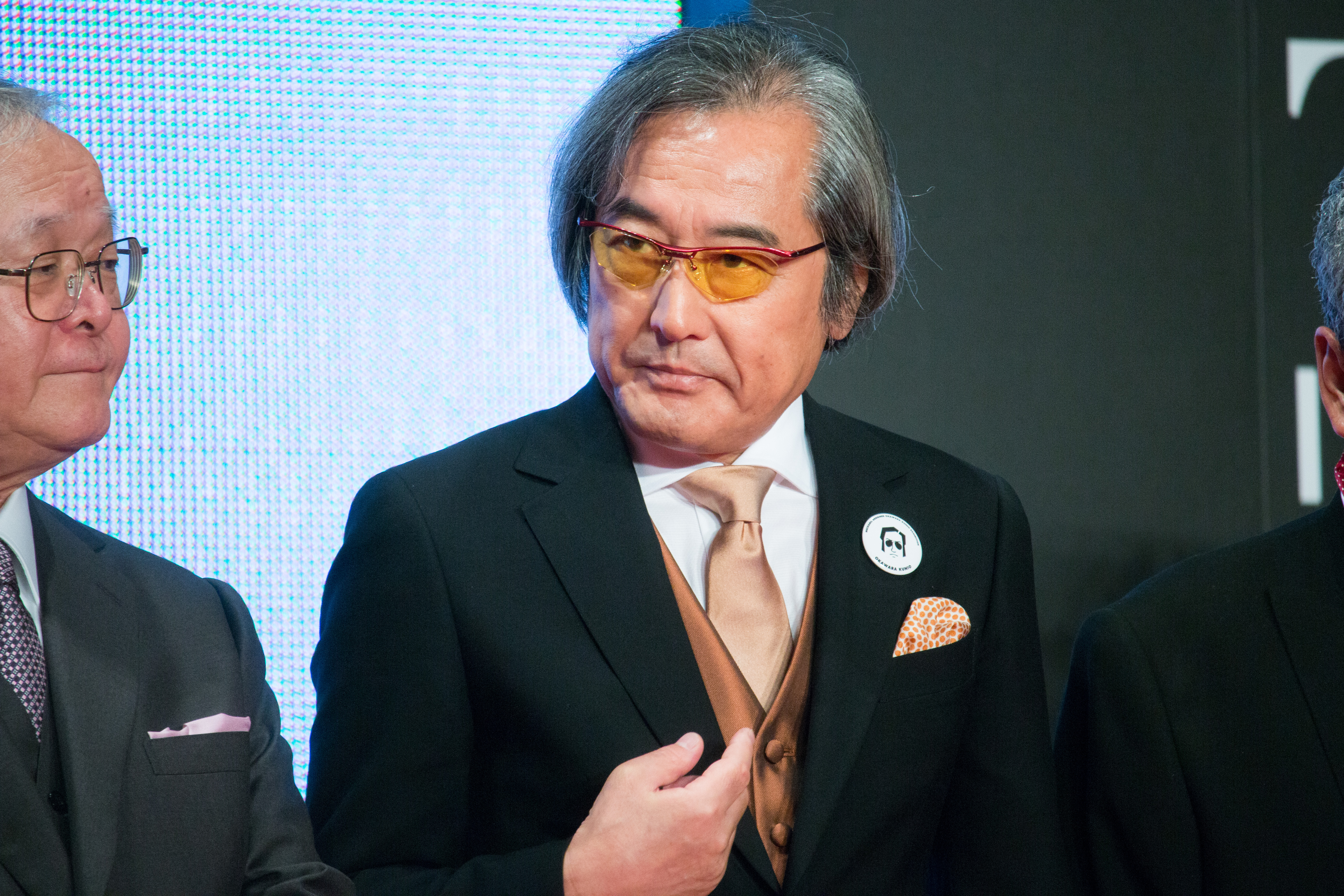 第28回 東京国際映画祭 オープニングセレモニー 大河原邦男 (ガンダムとその世界)